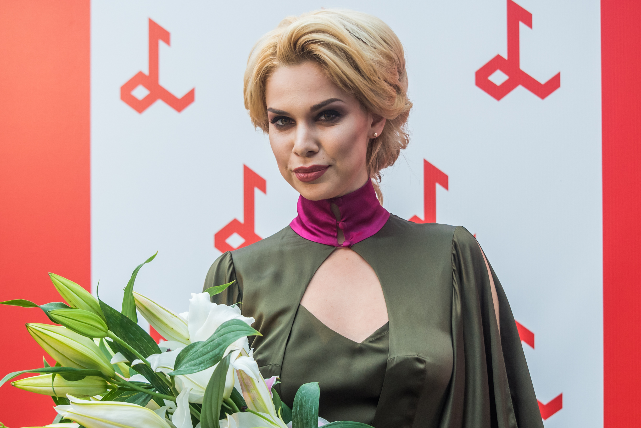 Саманта Тина на фестивале «Лайма. Рандеву. Юрмала 2017»